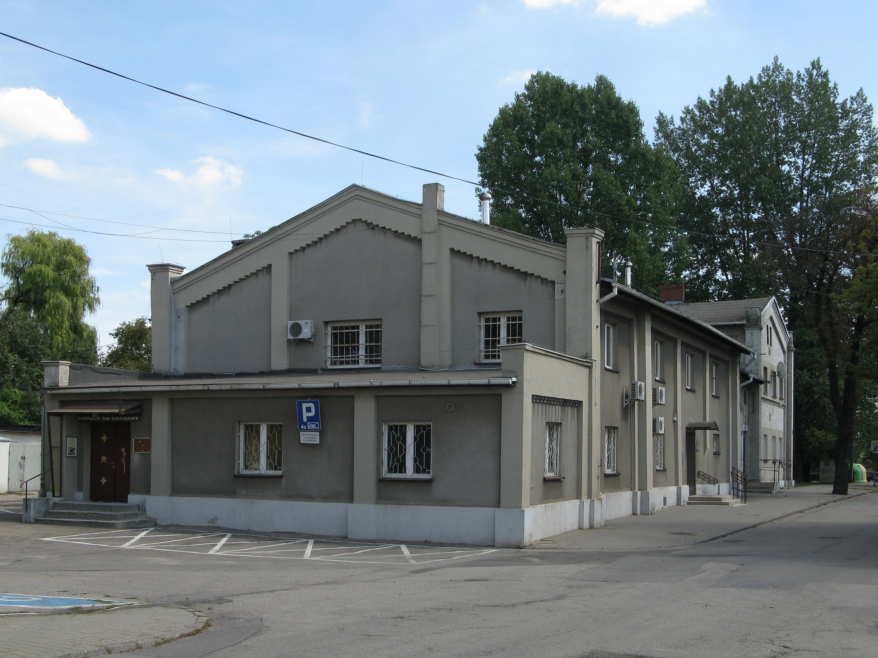 Kaplica św. Barbary naprzeciwko zabudowań zlikwidowanej kopalni węgla kamiennego Barbara-Chorzów w Chorzowie, przy ul. Wiejskiej 8, ustanowiona w 1980 roku.